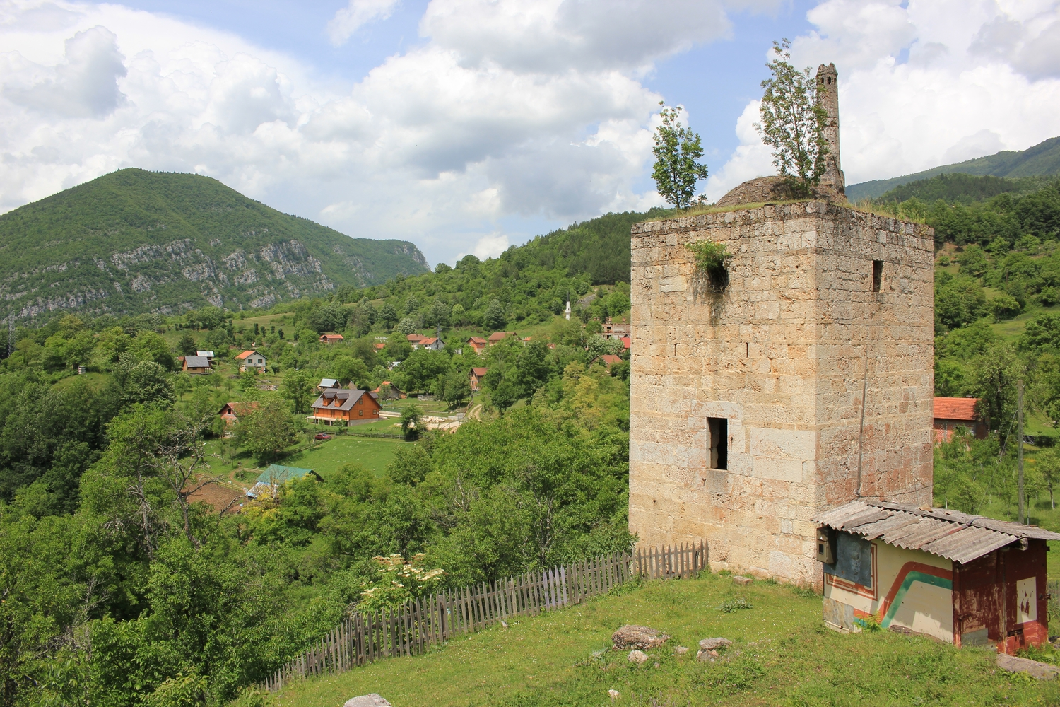 Der Wehrturm "Redžep Pašina kula" in Žepa, Bosnien und Herzegowina.